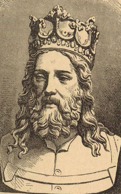 III. Kázmér lengyel király szobráról készült metszet, lásd fájlcím